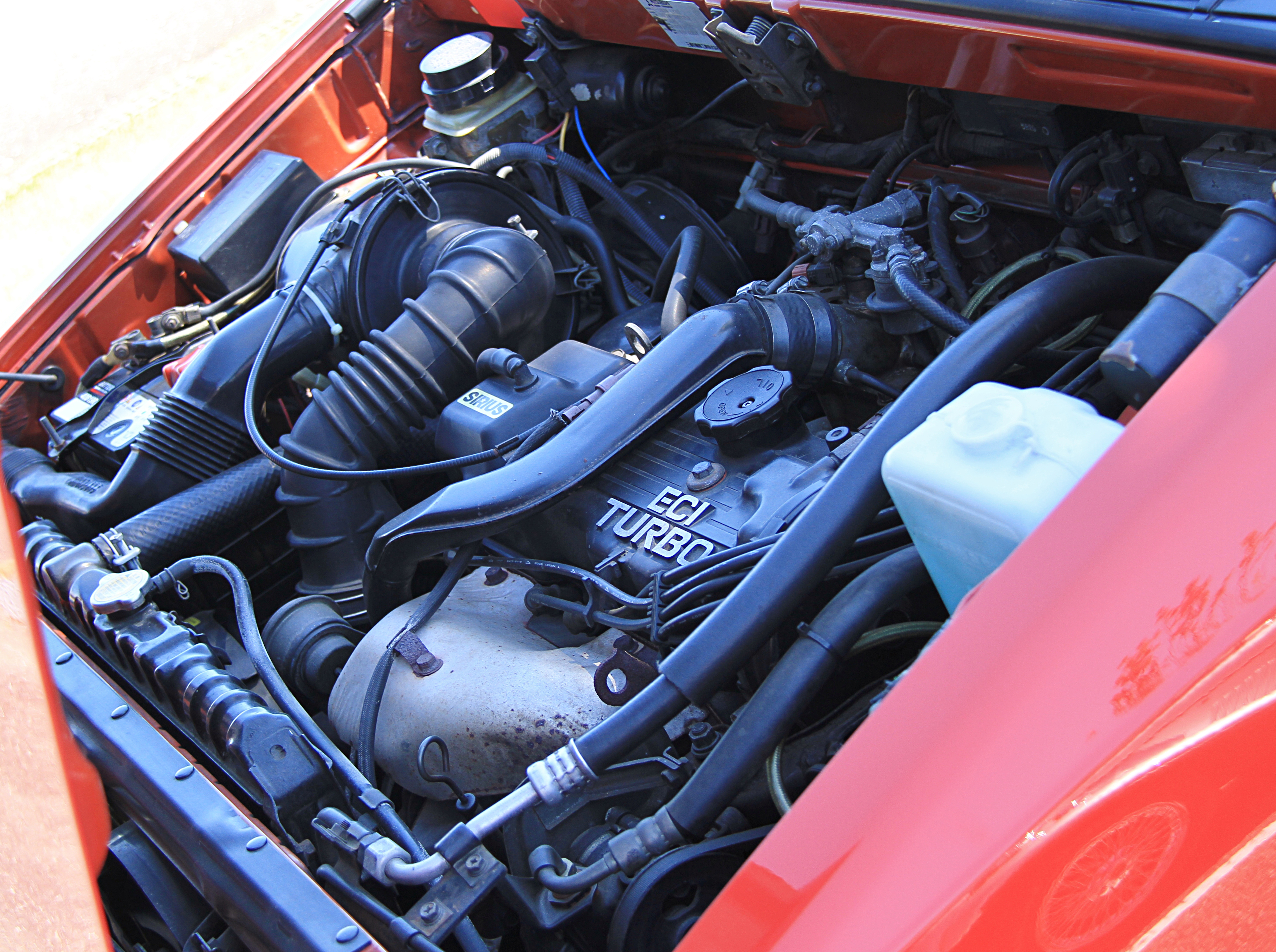 Mitsubishi Chariot MR